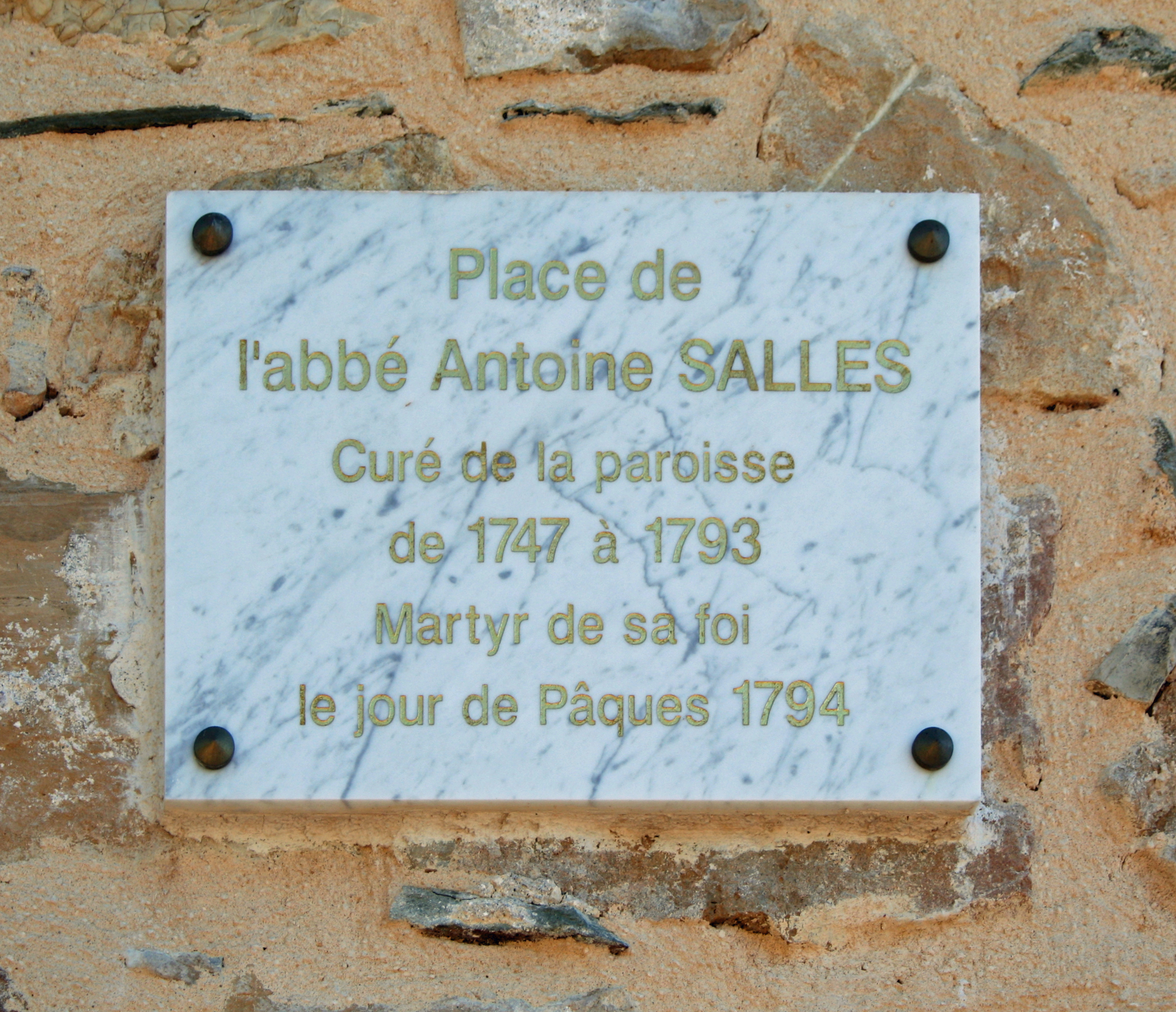 Taussac-la-Billière (Hérault) - plaque-mémorial sur la mur de l'église, rappelant le souvenir de l'abbé Antoine SALLES (curé du village entre 1747 et 1793), victime de la Révolution Française en 1794.